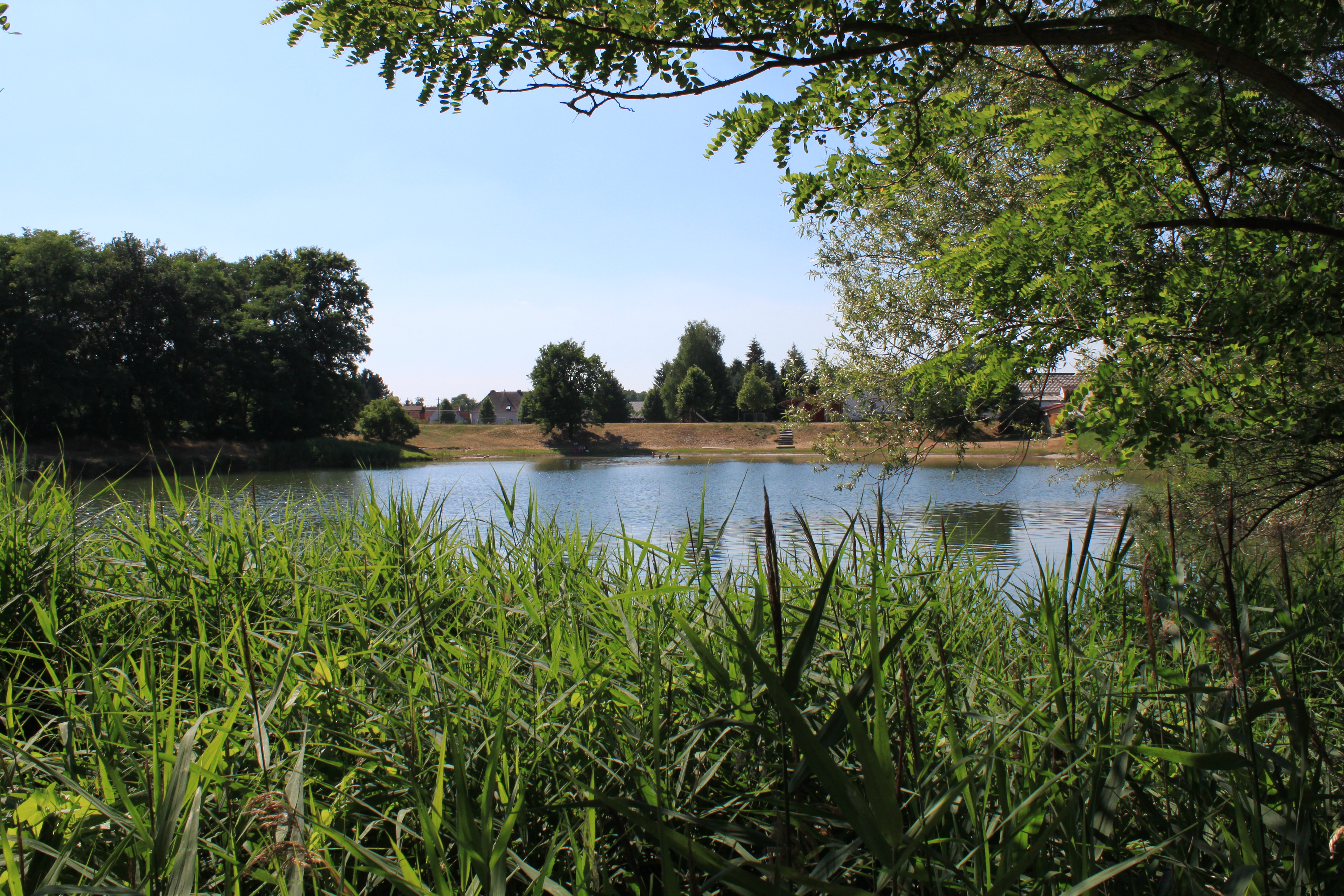 Badesee mit Festplatz und Freilichtbühne im Hintergrund